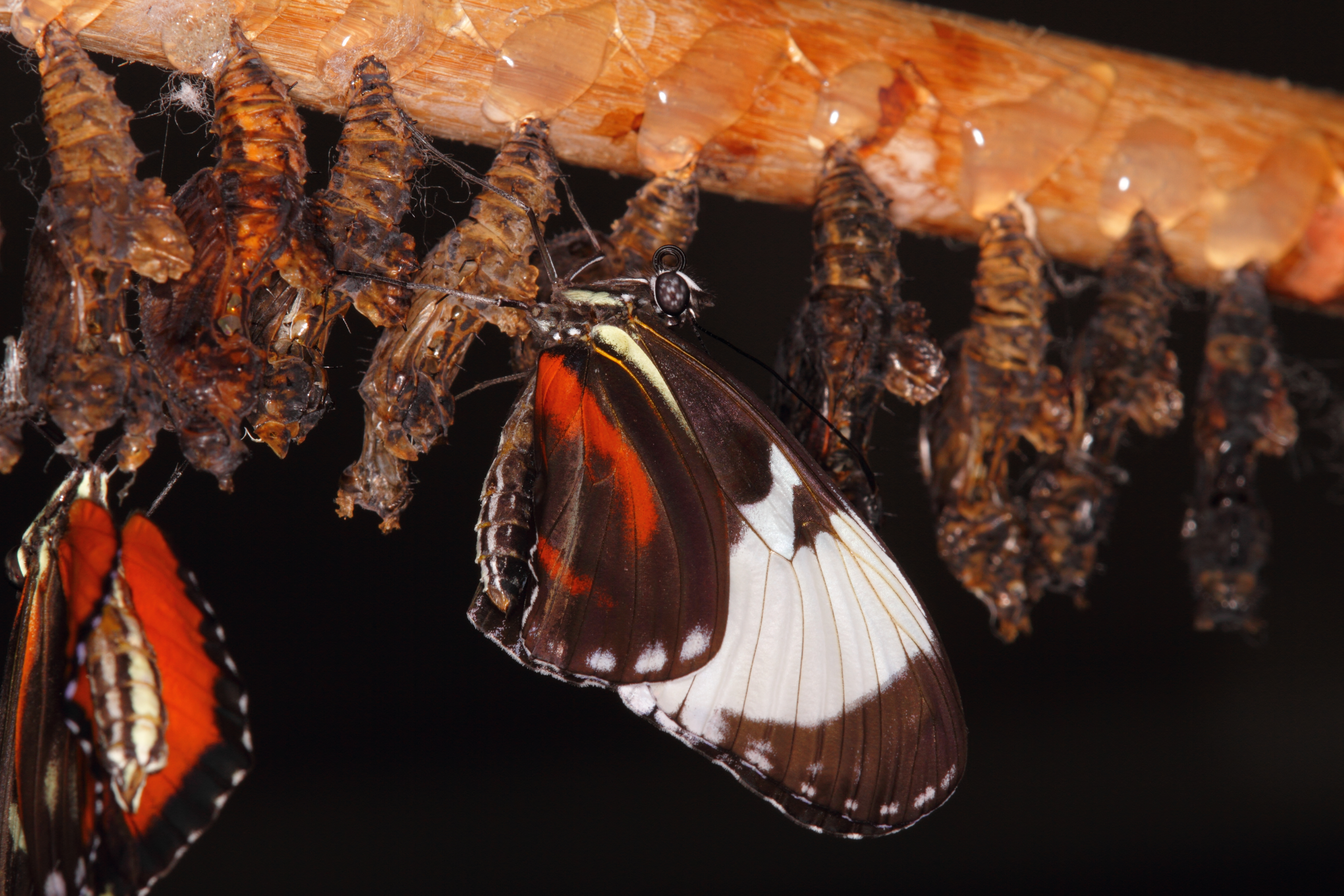 Frisch geschlüpfter Schmetterling (Heliconius cydno) im Aquariumhaus des Tiergarten Schönbrunns.